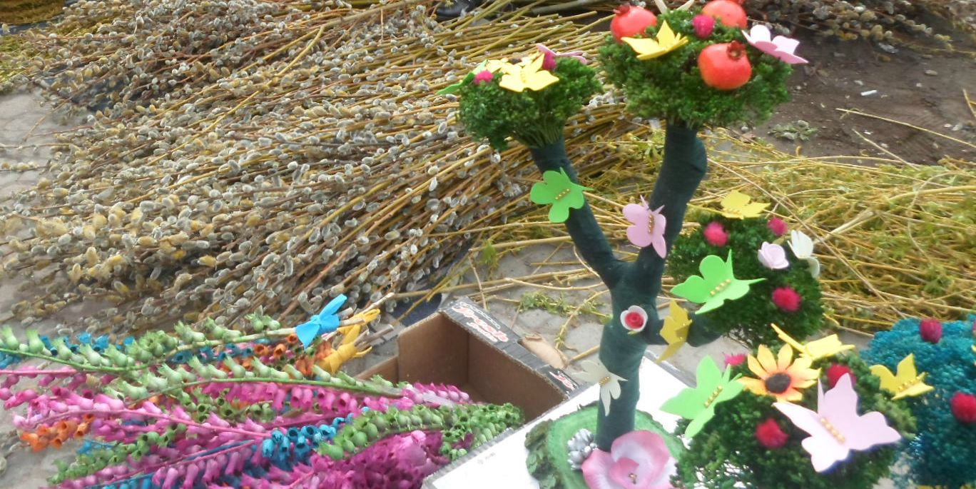 Ուռենու ճյուղ